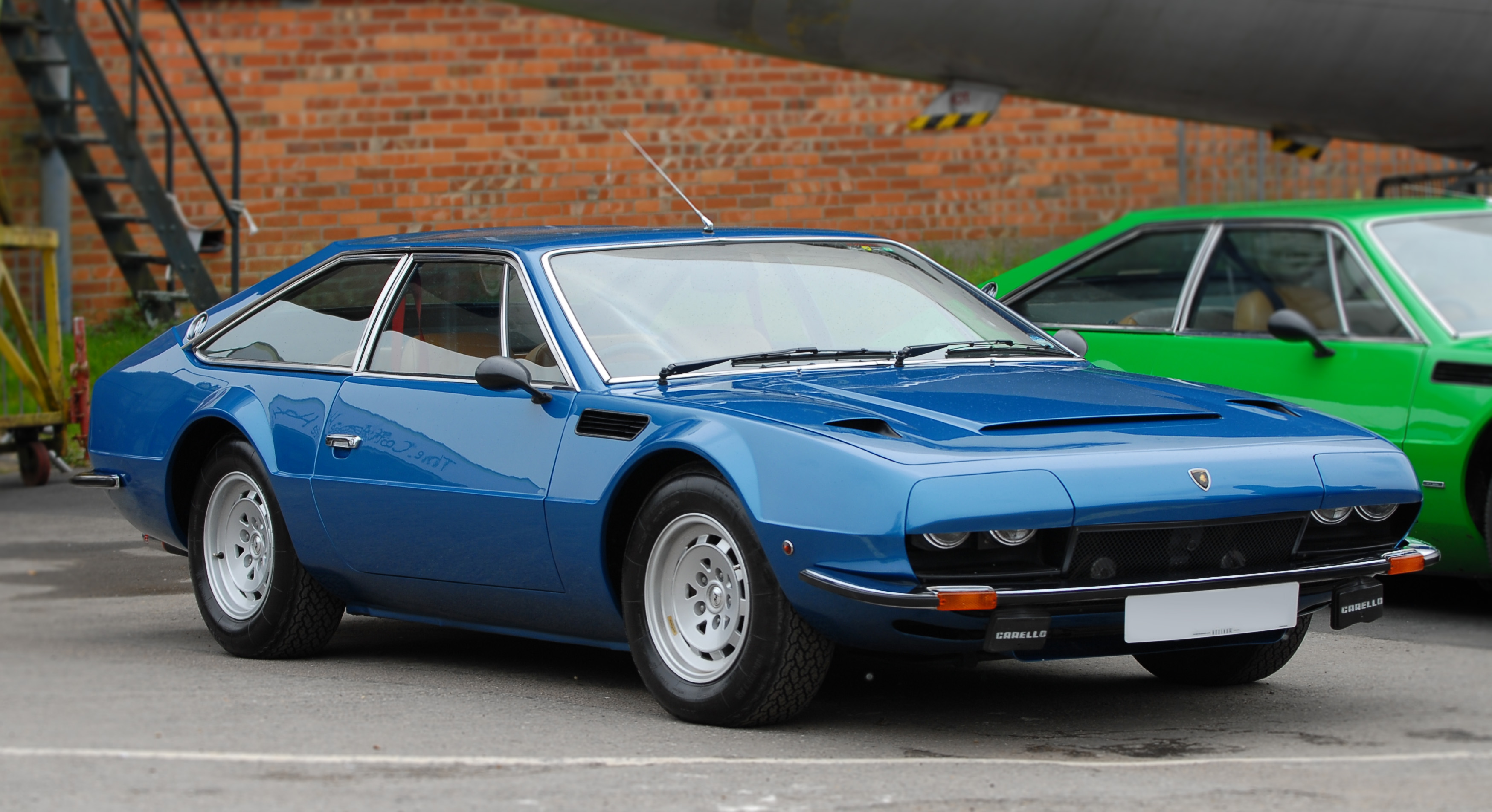 Lamborghini Jarama at AutoItalia Brooklands, May 2012